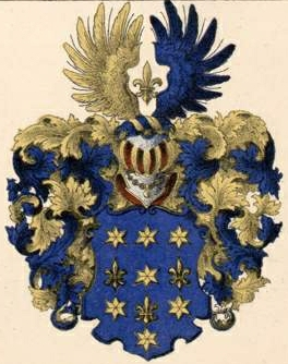 Ungern-Sternbergi suguvõsa aadlivapp